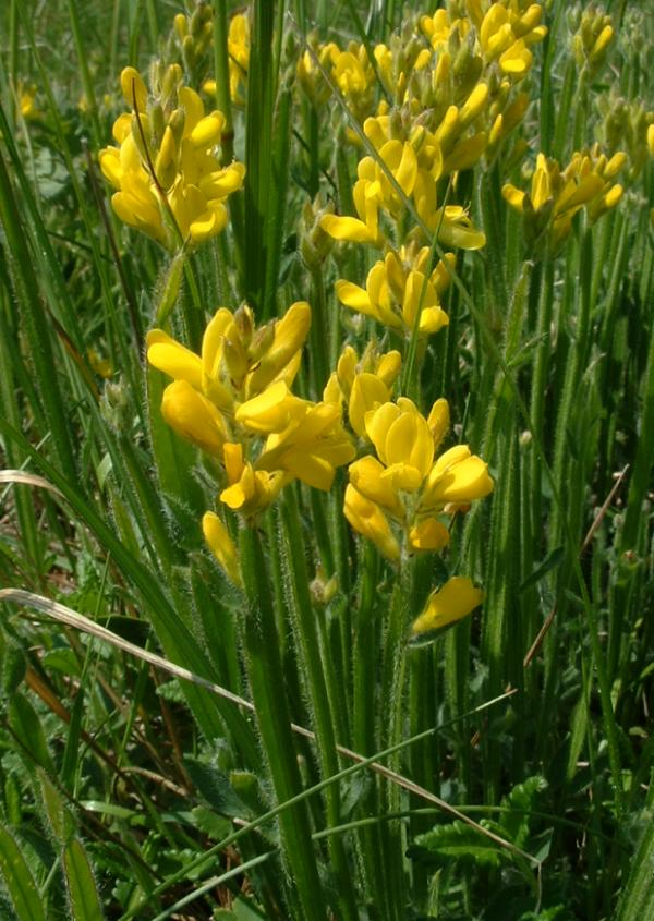 Genêt ailé, Bucey-lès-Gy